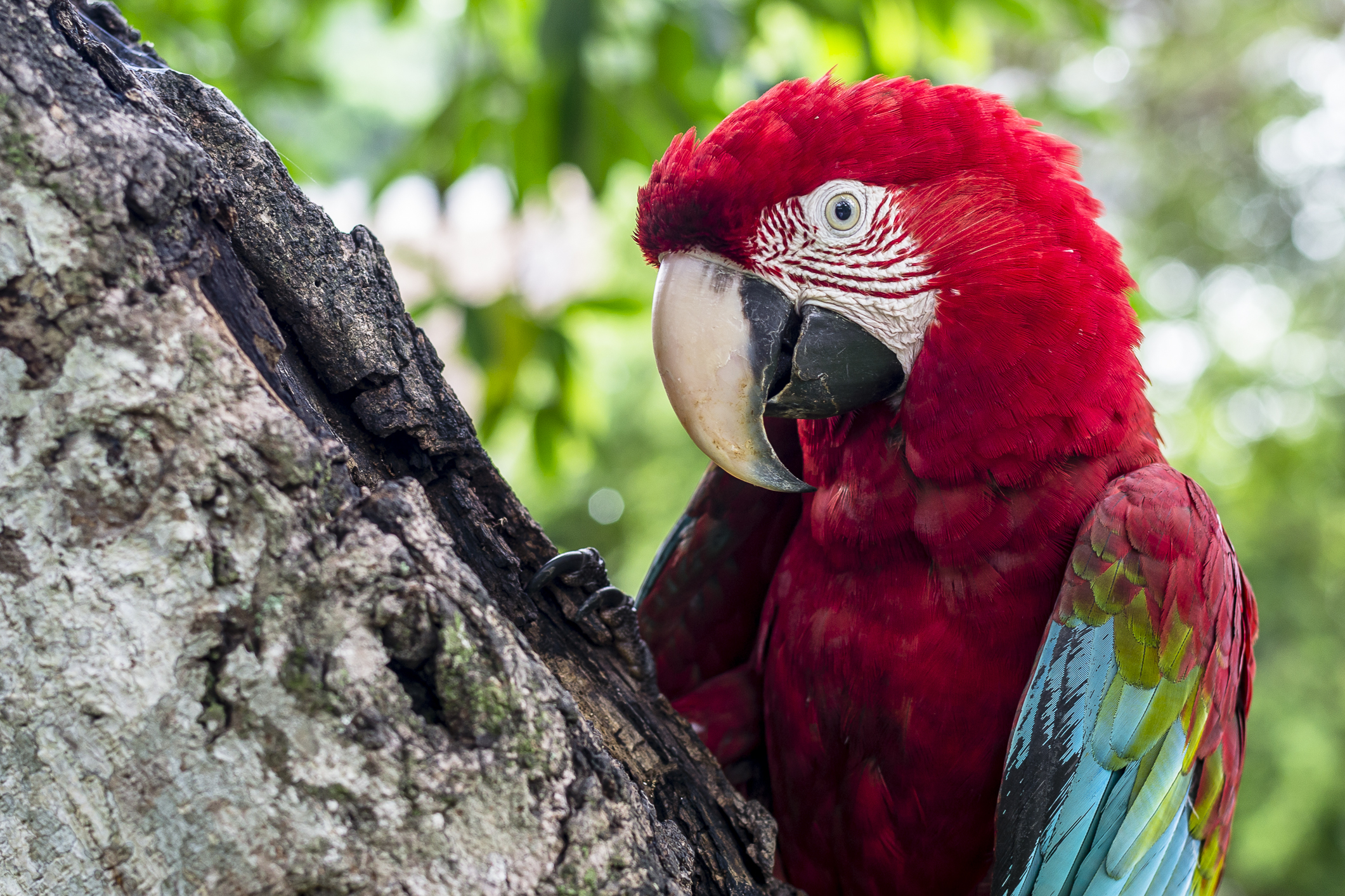 Barinas, Venezuela